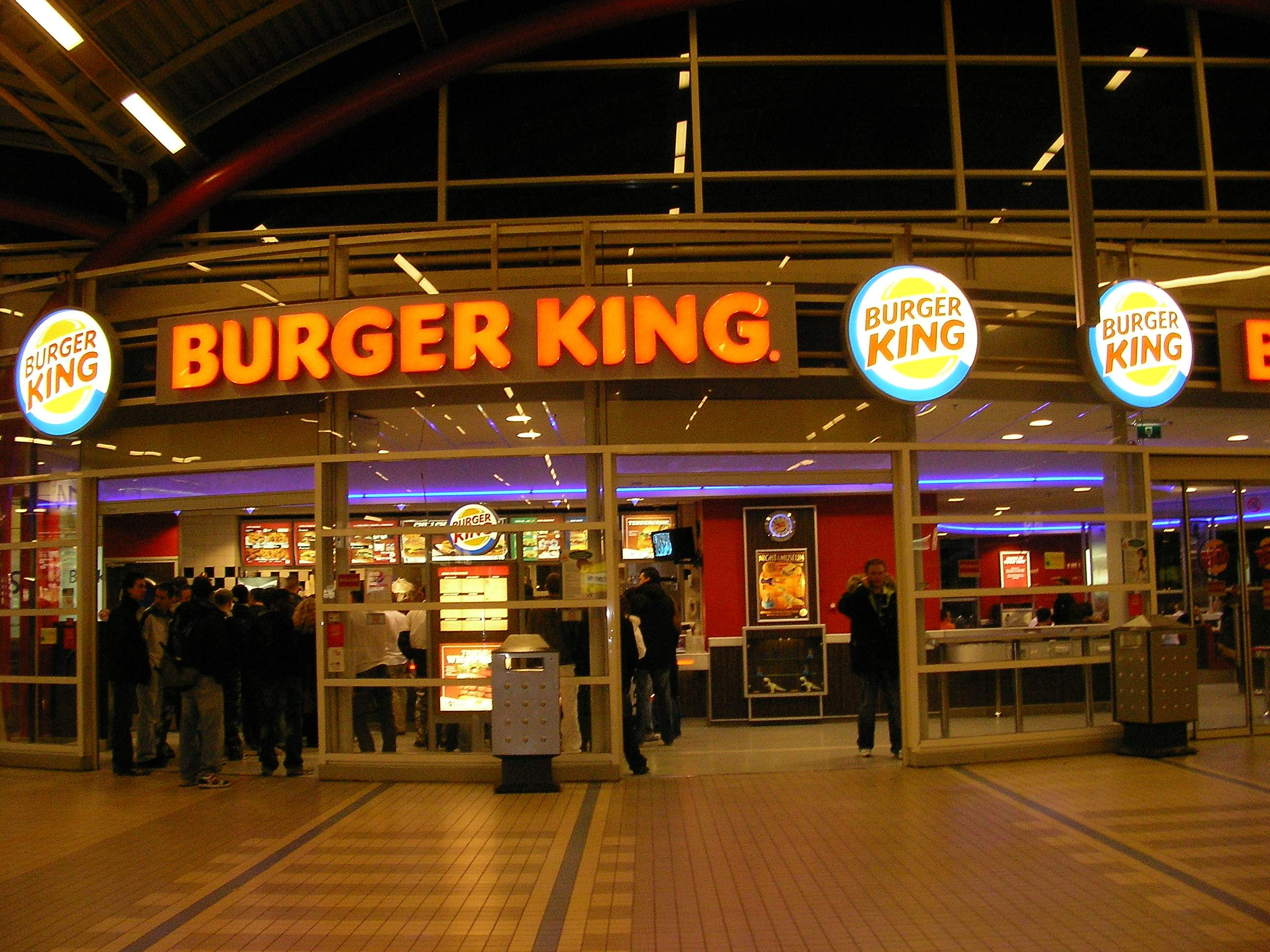 Le Burger King à Utrecht (Pays-Bas).